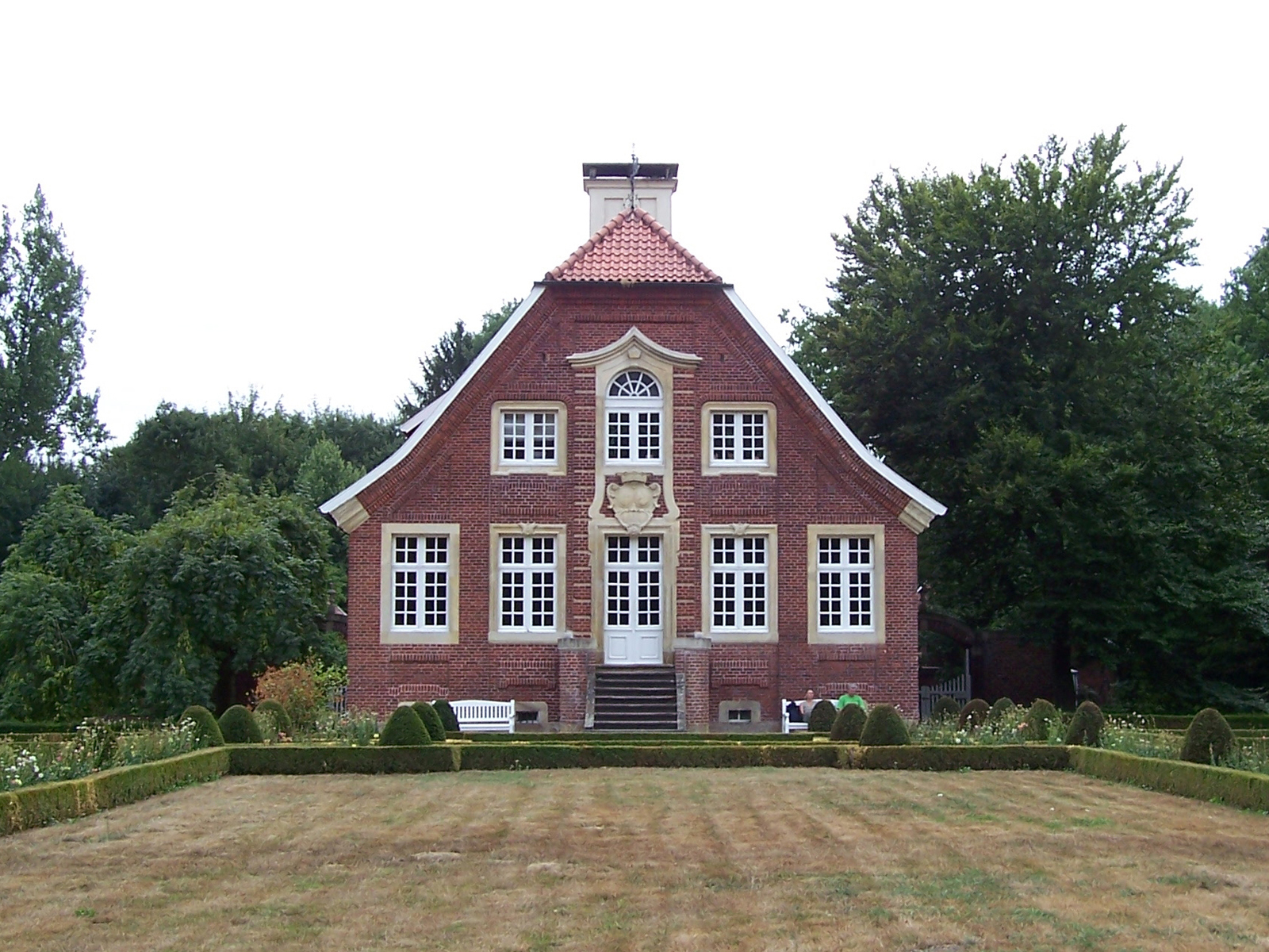 Haus Rüschhaus in Münster rear